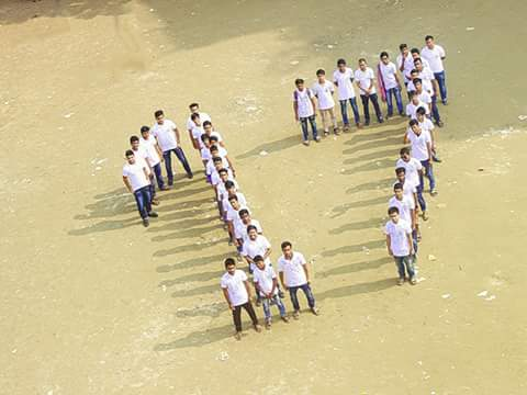 এইচএসসি ব্যাচ ২০১৭